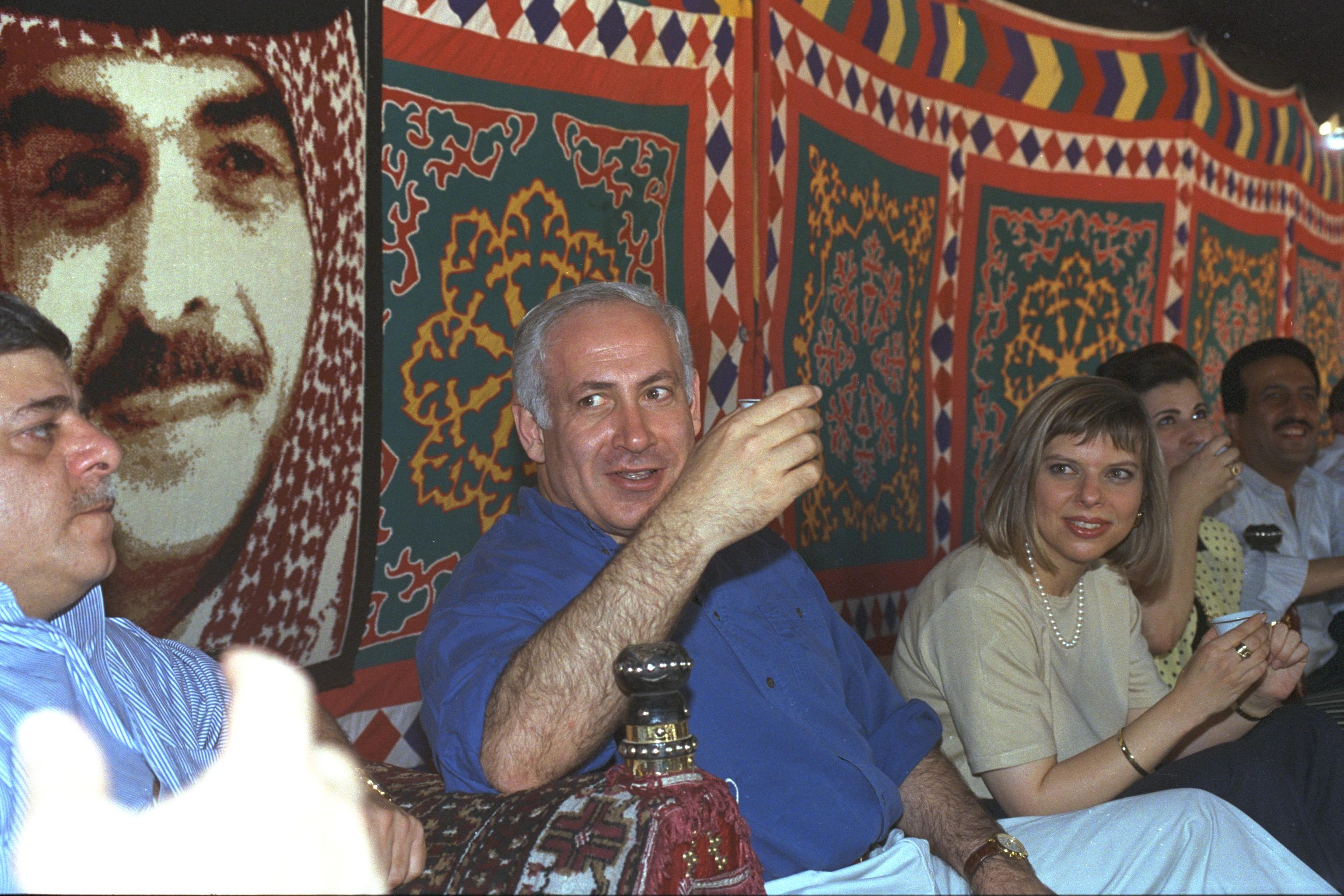 P.M. Benjamin Netanyahu and his wife, Sara, sip coffee in a Beduin tent during their visit to the ancient city of Petra, Jordan (05/08/1996) ראש הממשלה, בנימין נתניהו ואישתו שותים קפה באוהל בדואי במהלך ביקורם בעיר העתיקה פטרה שבירדן Photo: OHAYON AVI.